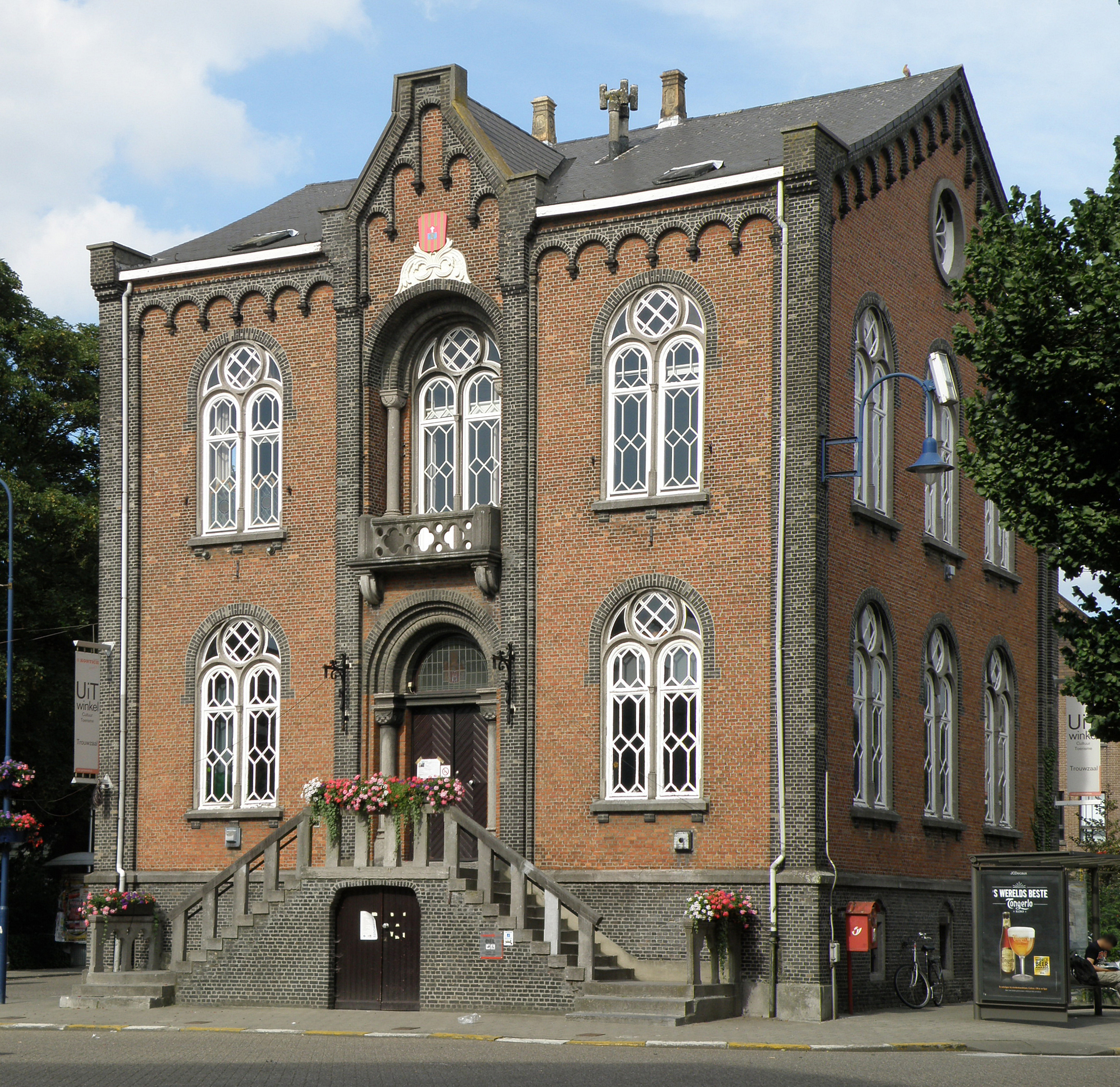 Kontich (prov. Antwerpen, België). Oud-gemeentehuis.